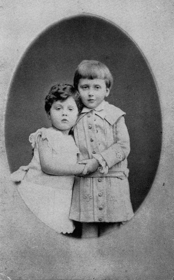 Robert et Marcel Proust le 1er mars 1876, photographe inconnu. Catalogue de l'exposition Marcel Proust, du temps perdu au temps retrouvé ..., 1965. Bnf, Paris.